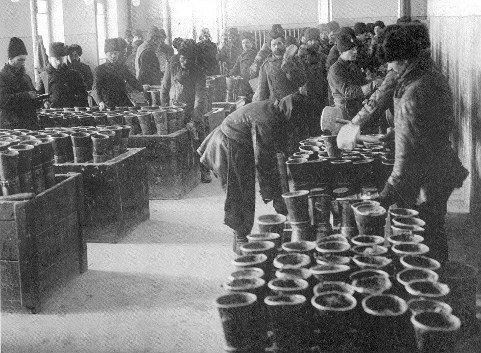 1915. Заливка корпусов снарядов тротилом в снаряжательной мастерской.jpg